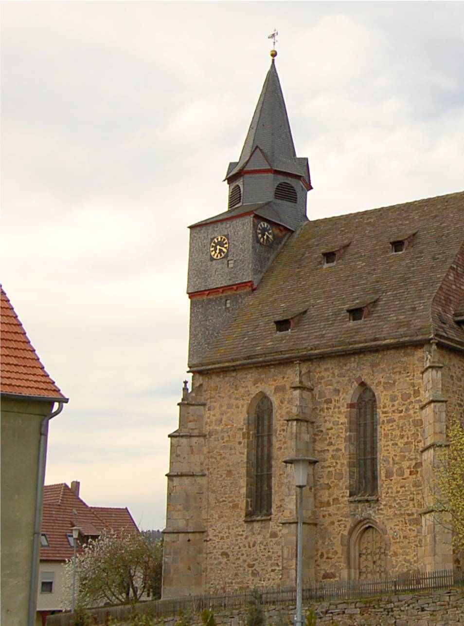 Die historische Wallfahrtskirche in Gottsbüren